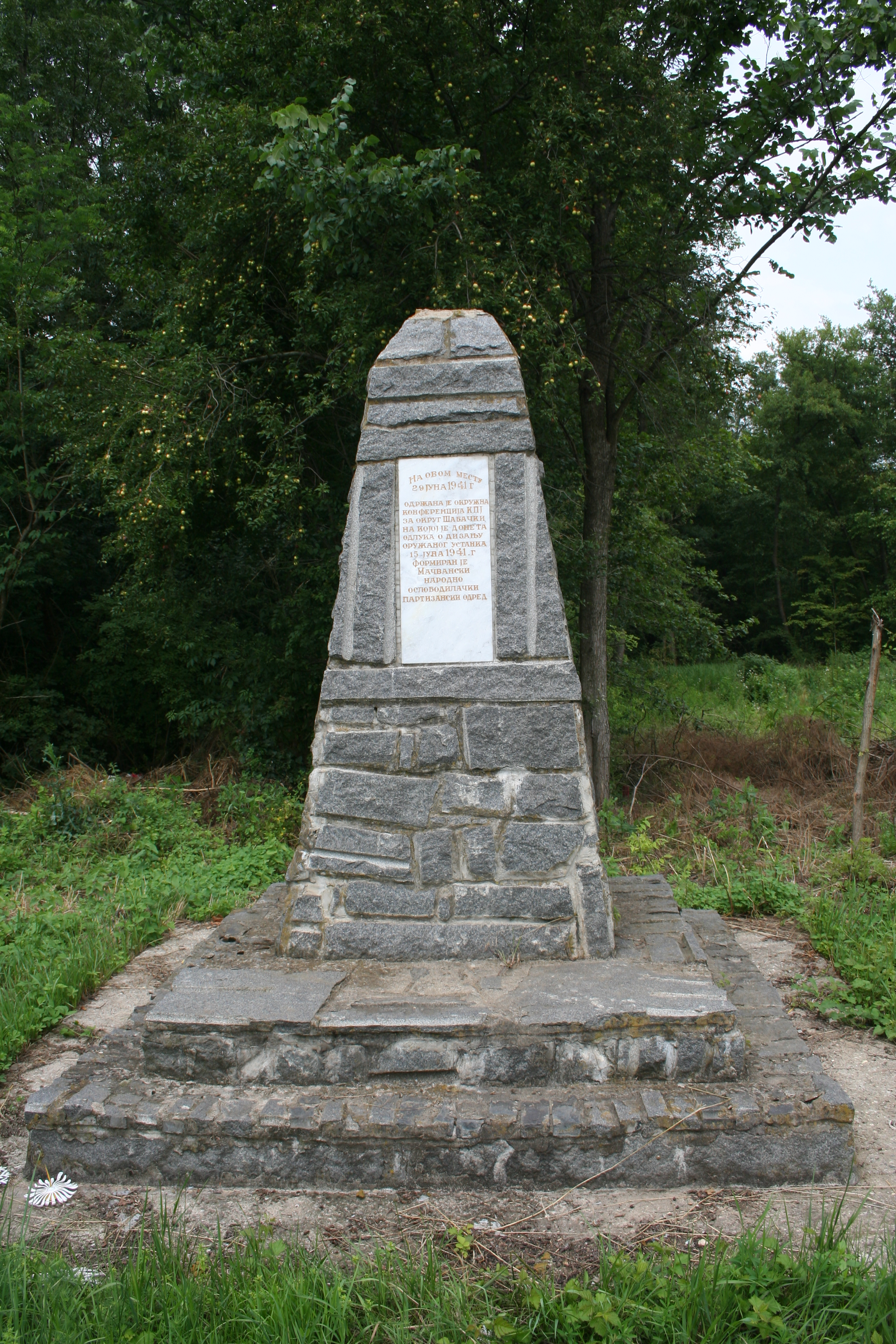 Spomenički kompleks "Bubanja" Glušci